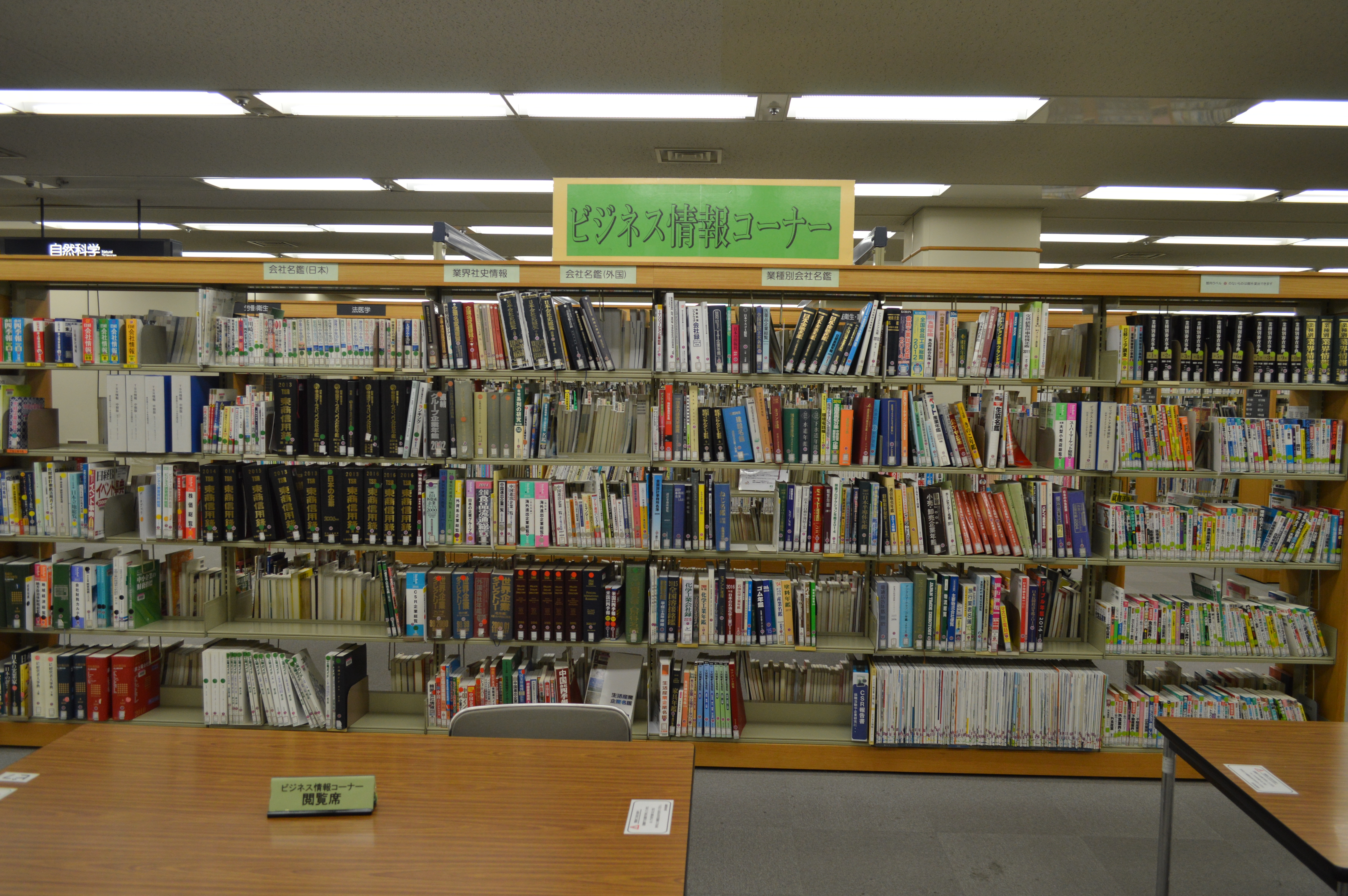 愛知県図書館4階。ビジネス情報コーナー。